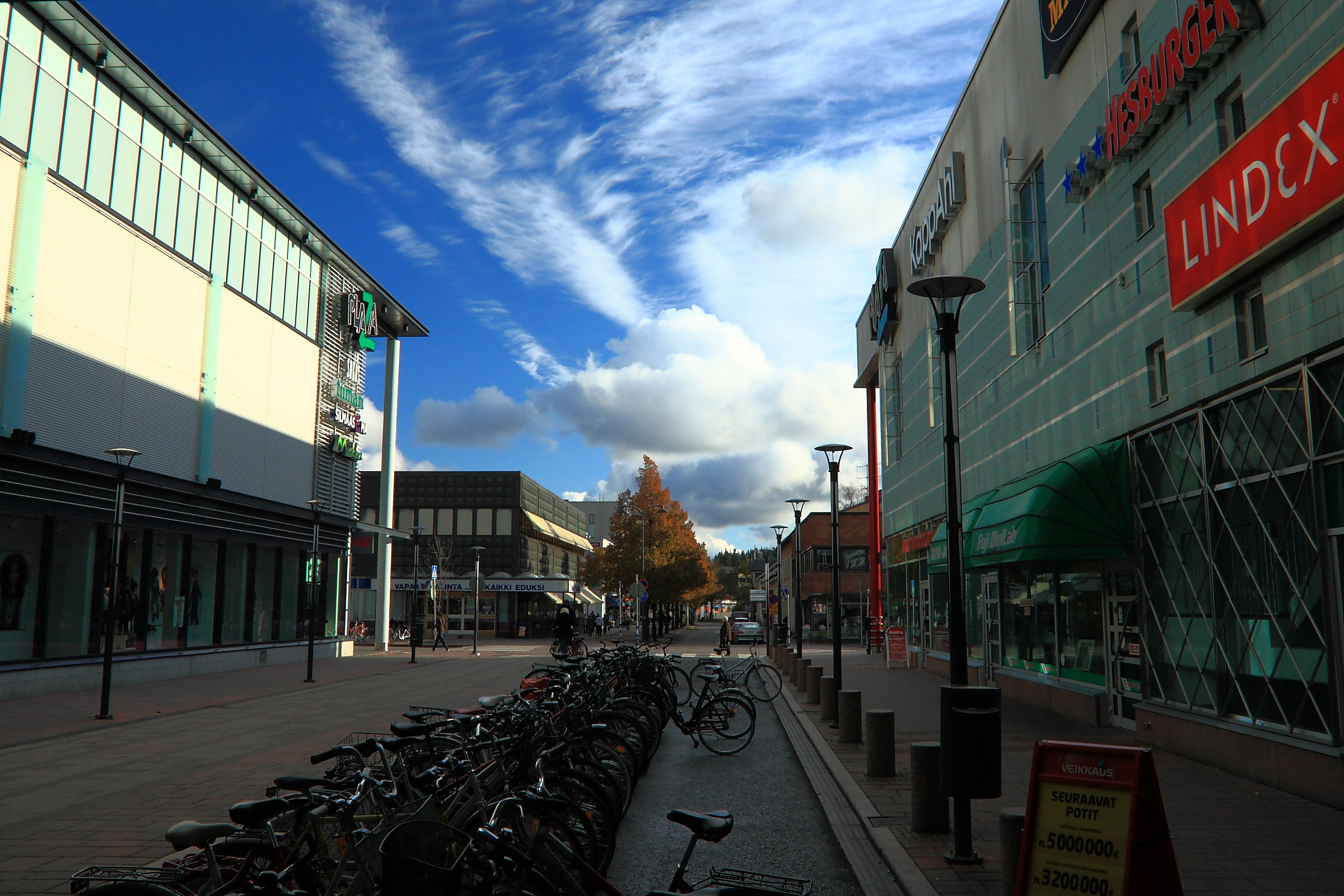 Salo keskusta